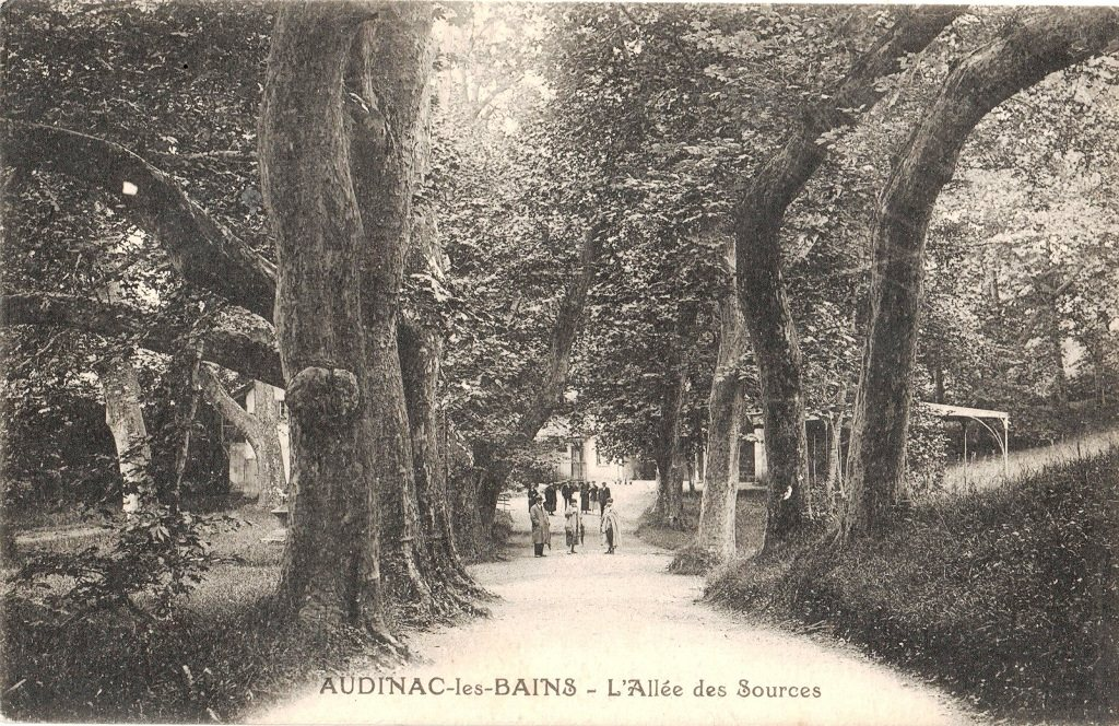 Carte postale d'Audinac-les-Bains: l'allée des Sources